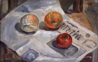 Julio Ortiz de Zárate Naturaleza muerta